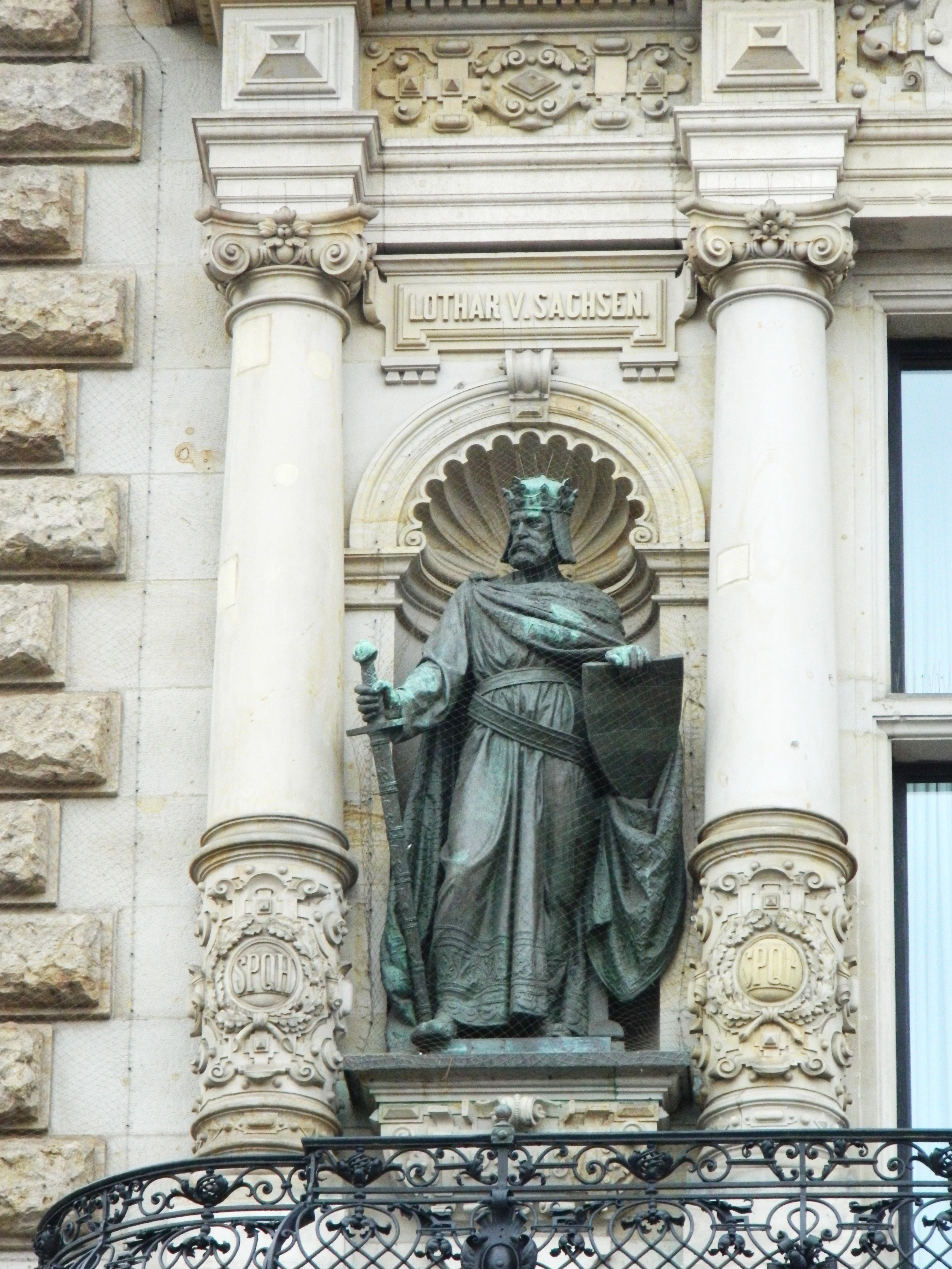 Lothar v. Sachsen